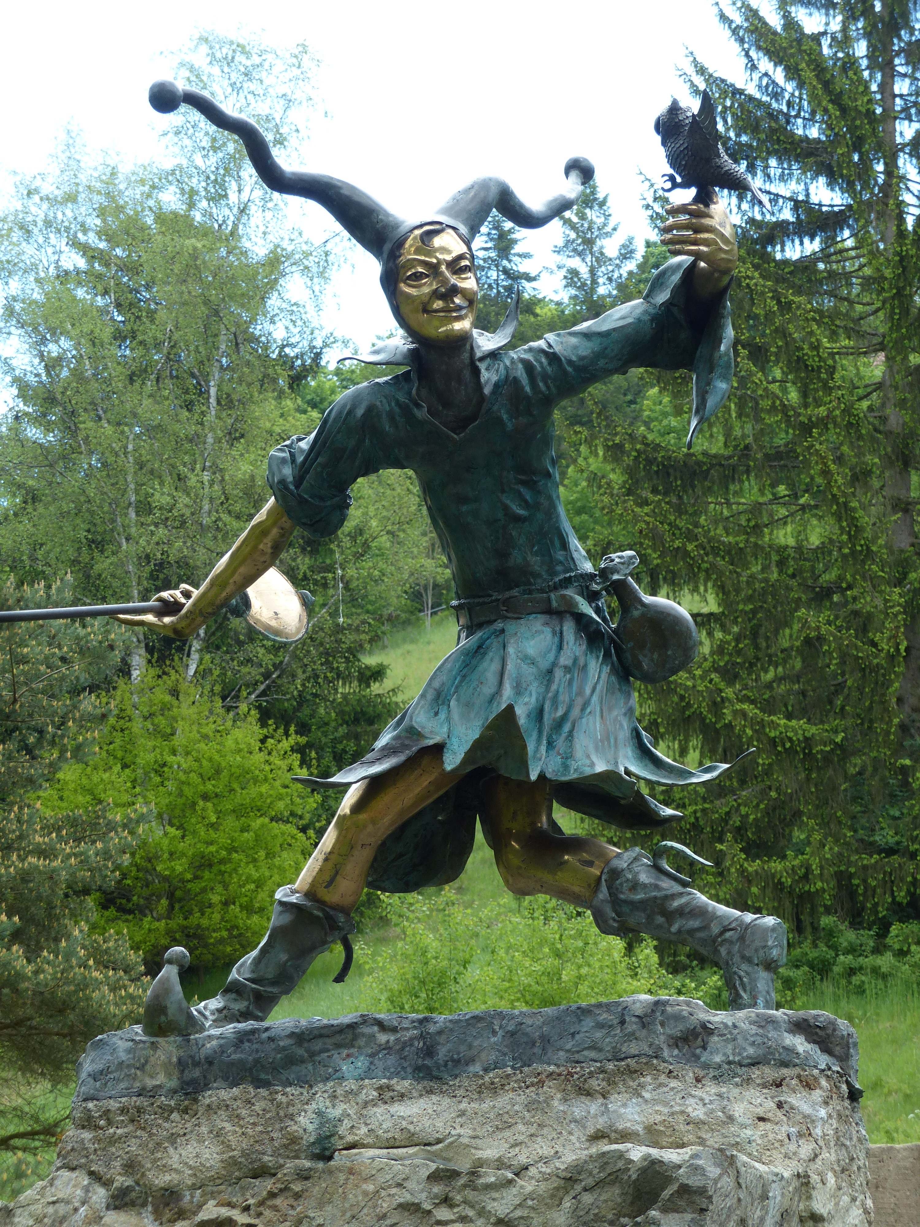 Ansichten des Ortsteils Waffenhammer